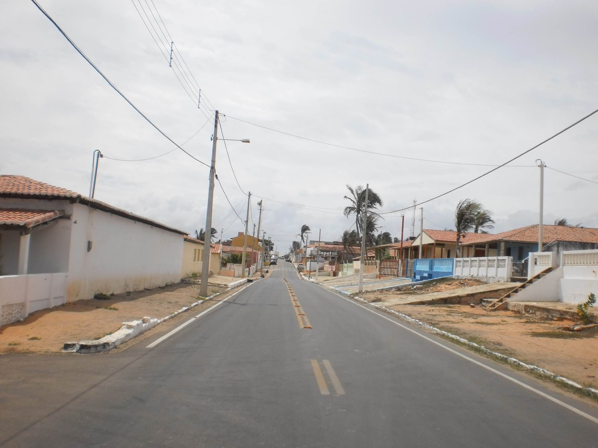 Rua Dimarco Matriz, Tibau, Rio Grande do Norte, Brasil.